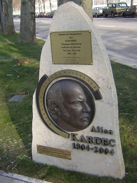 Mémorial dédié à Allan Kardec à Lyon. Photo fournie par le centre spirite de Bron et laissée libre de droits.